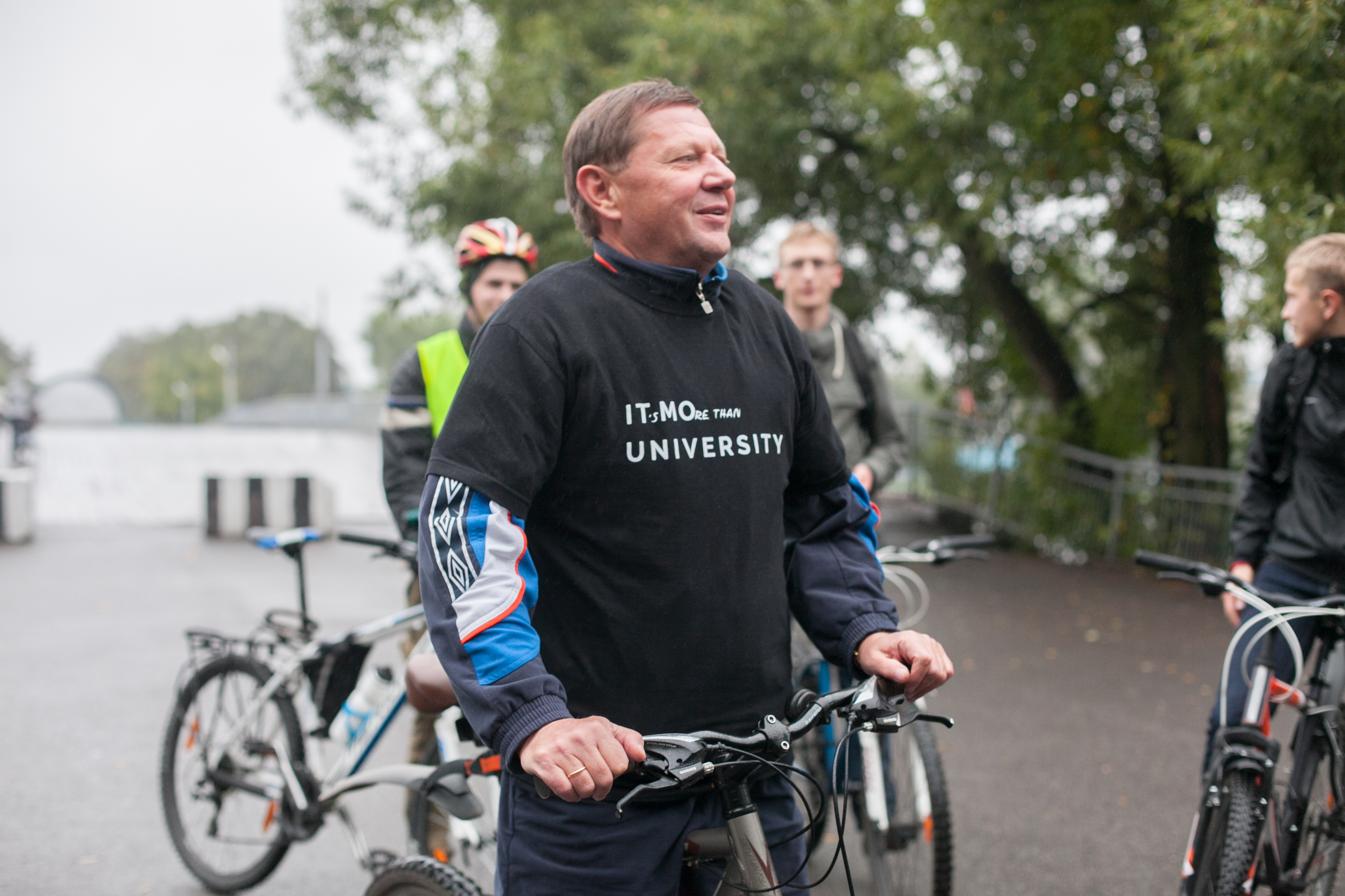 Ректор Университета ИТМО Владимир Васильев на велопробеге на Елагином острове